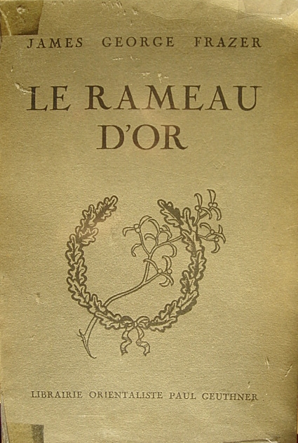 Couverture du livre de James Frazer, Le rameau d'or